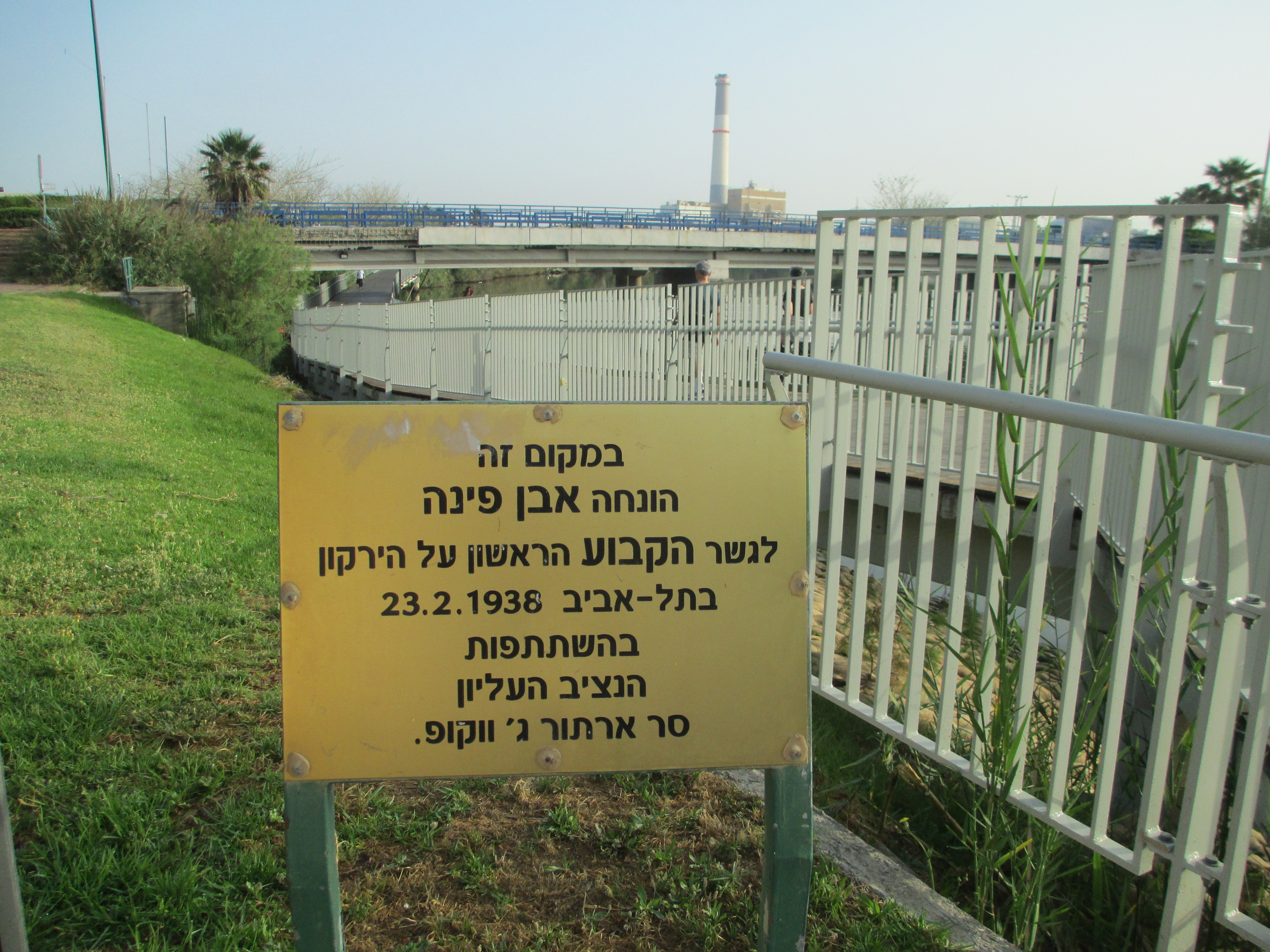 לוחית זיכרון לגשר ווקופ בתל אביב